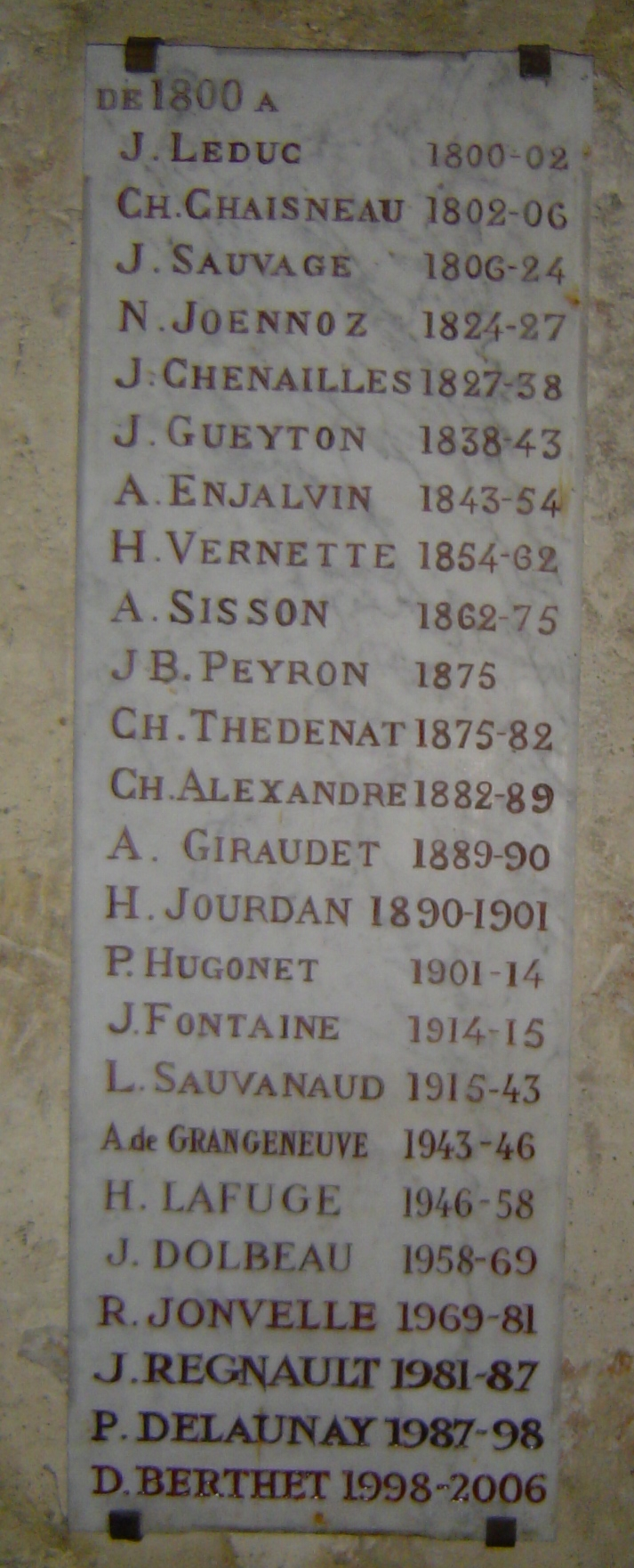 Antony - Liste des curés (2/2)